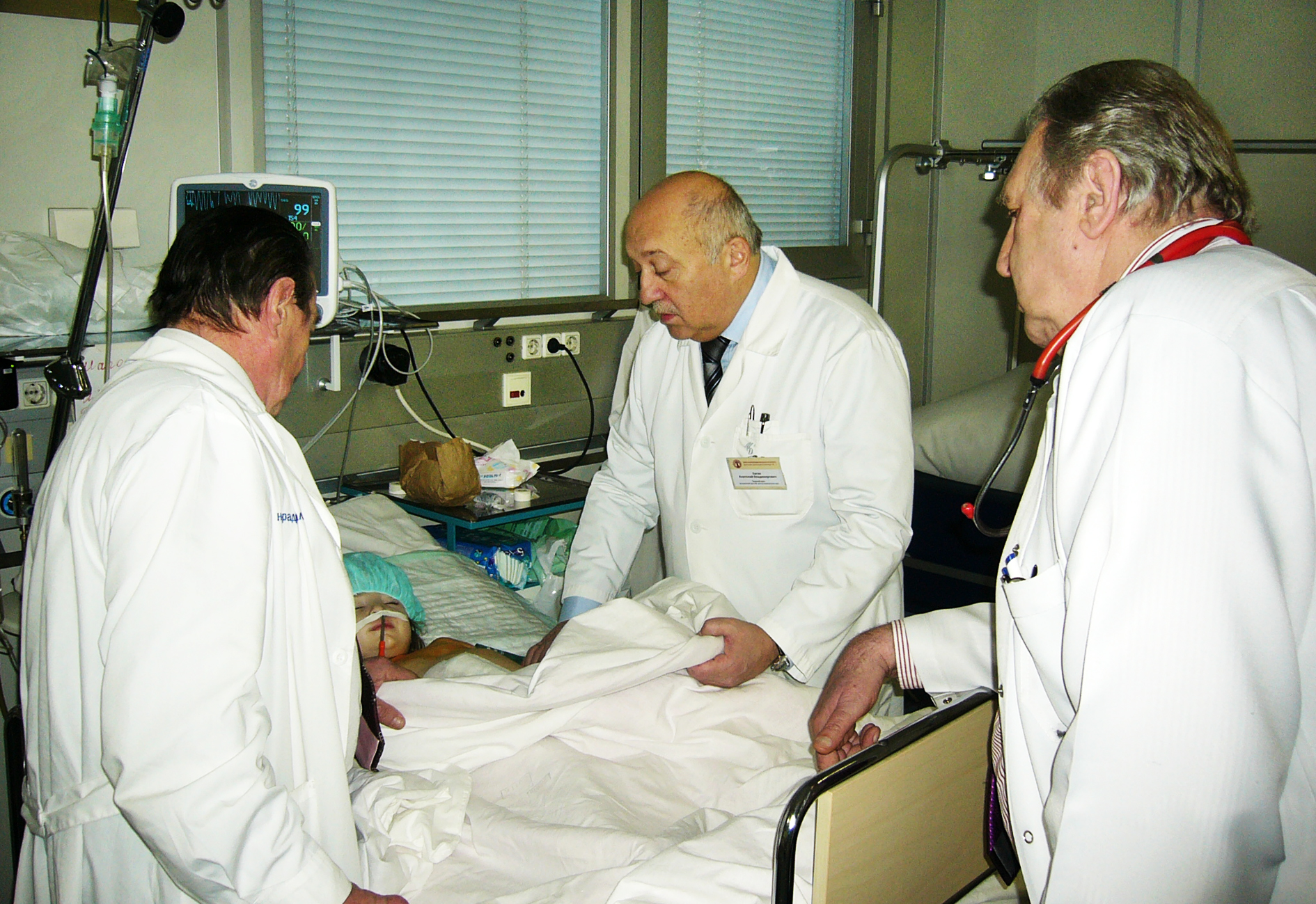 Главный врач ДГБ № 1 Санкт-Петербурга Анатолий Каган с начмедами: Вячеславом Любименко (слева) и Павлом Кореневым (справа)